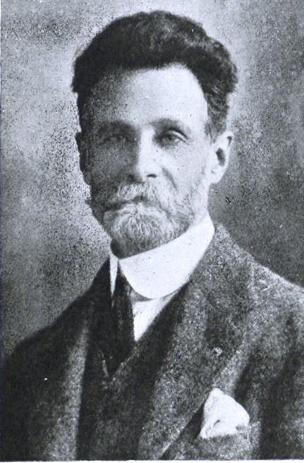 Alfredo Helsby Hazell fue un pintor chileno (Valparaíso, 22 de julio de 1862-Santiago 24 de julio de 1933) que es considerado el paisajista del sur de Chile y uno de los más grandes maestros de la pintura chilena del siglo XIX por su radicalización de la percepción visual y el acomodo de los medios plásticos a la sintonía dinámica de la naturaleza.